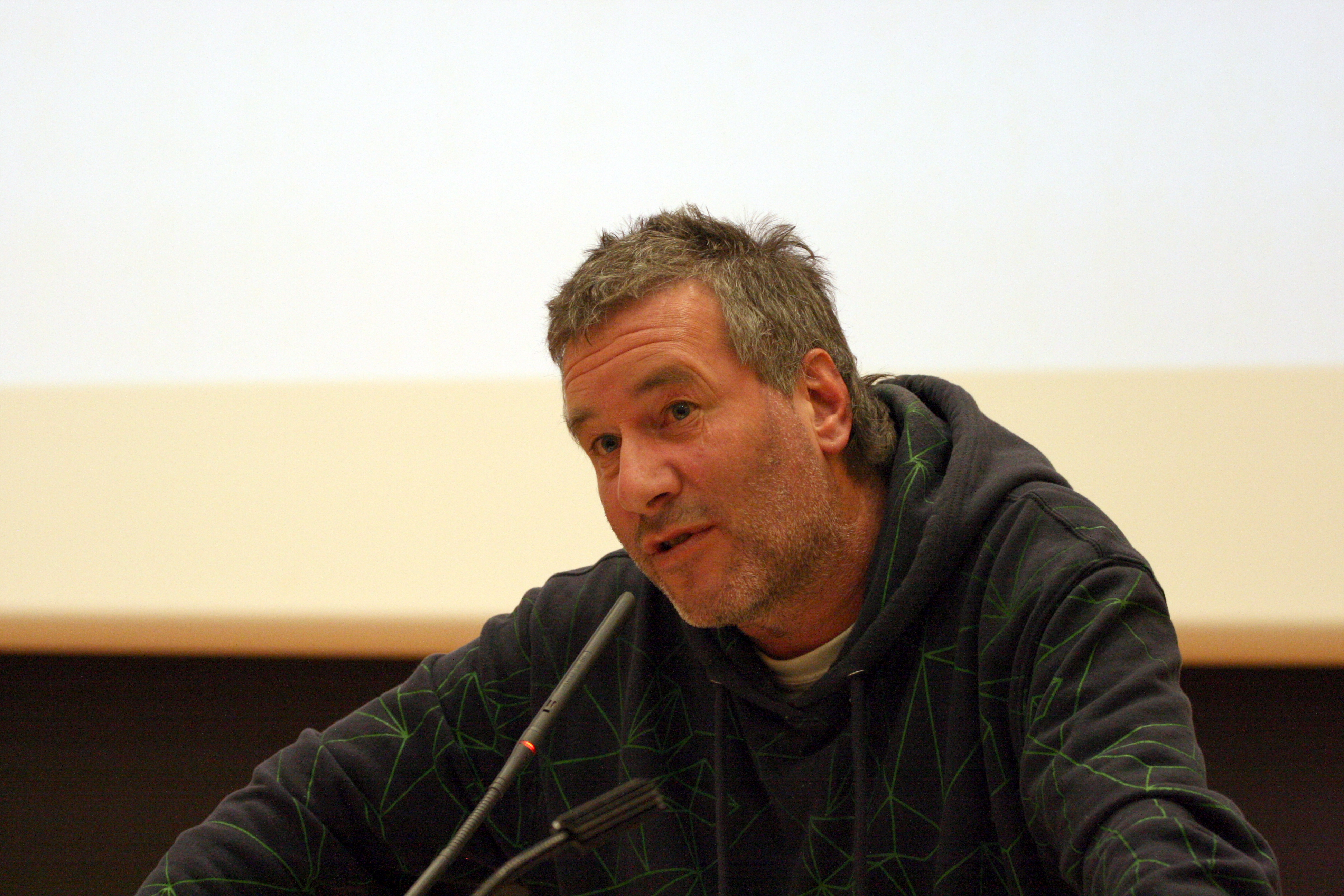 Arild Rønsen under en fildelingsdebatt ved Universitetet i Oslo 23. april 2009.